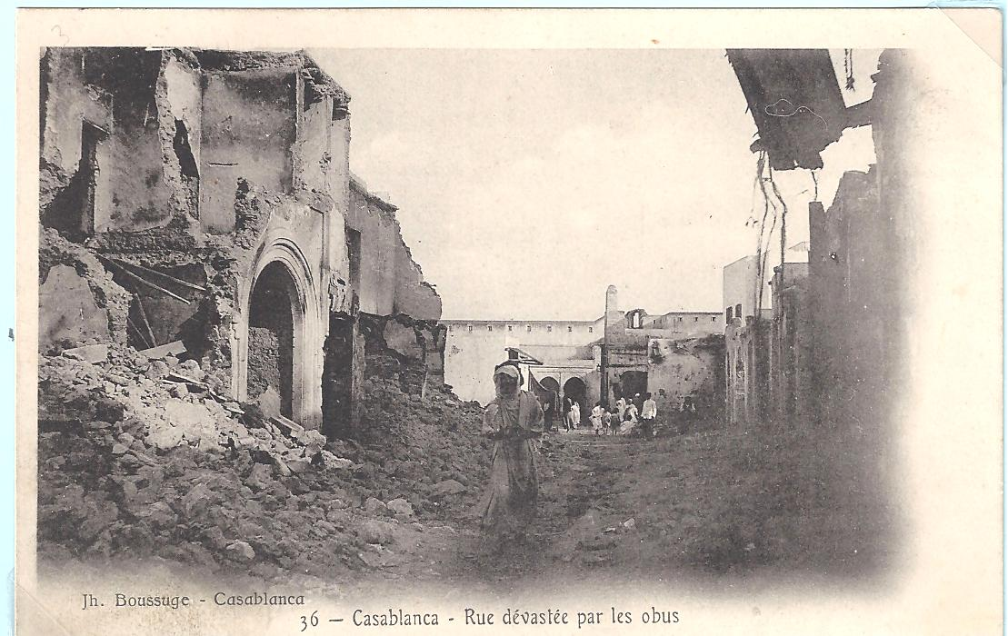 "شارع دمره القصف" قصف الدار البيضاء المغربية عام 1907 من قبل القوات الفرنسية